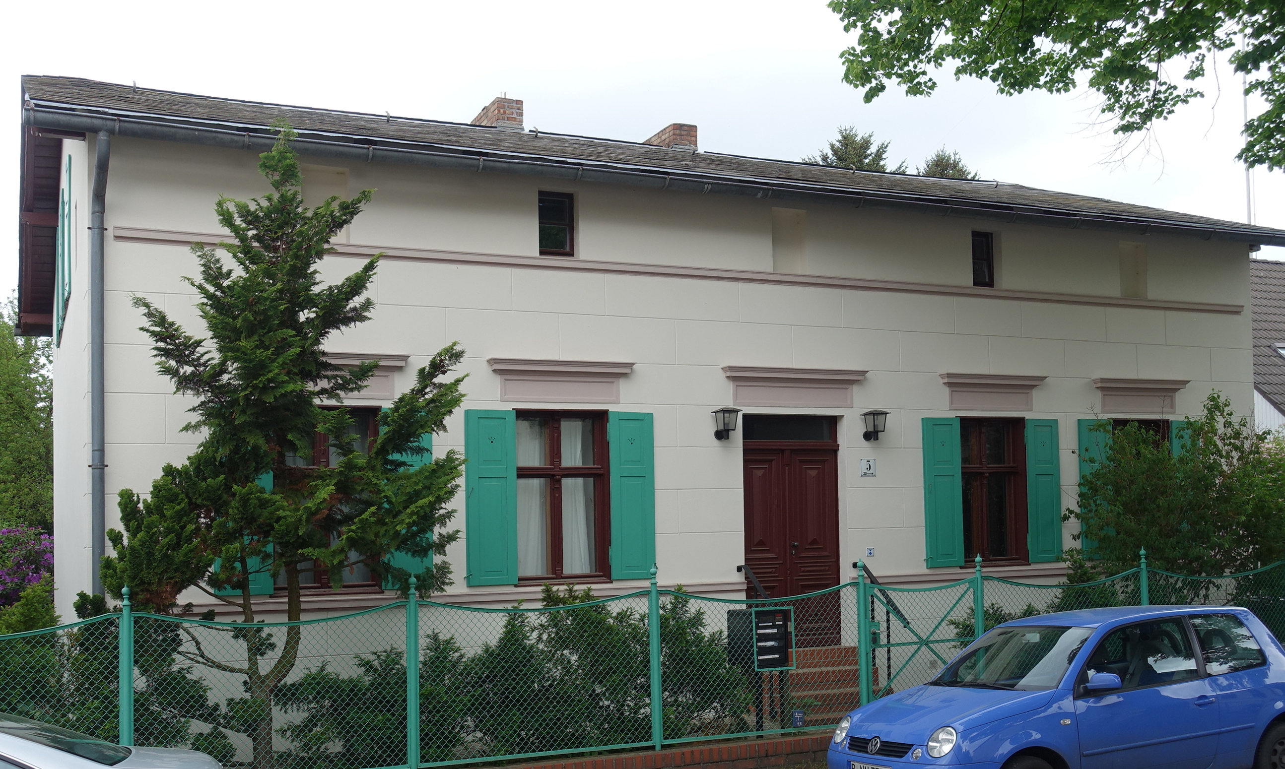 Wohnhaus